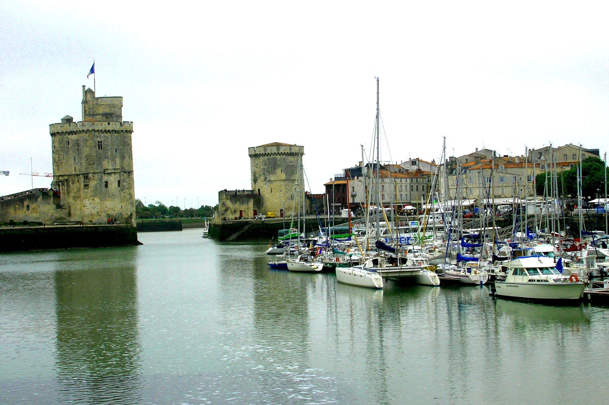 Fen Hafen vu La Rochellematt sengen 2 Tierm